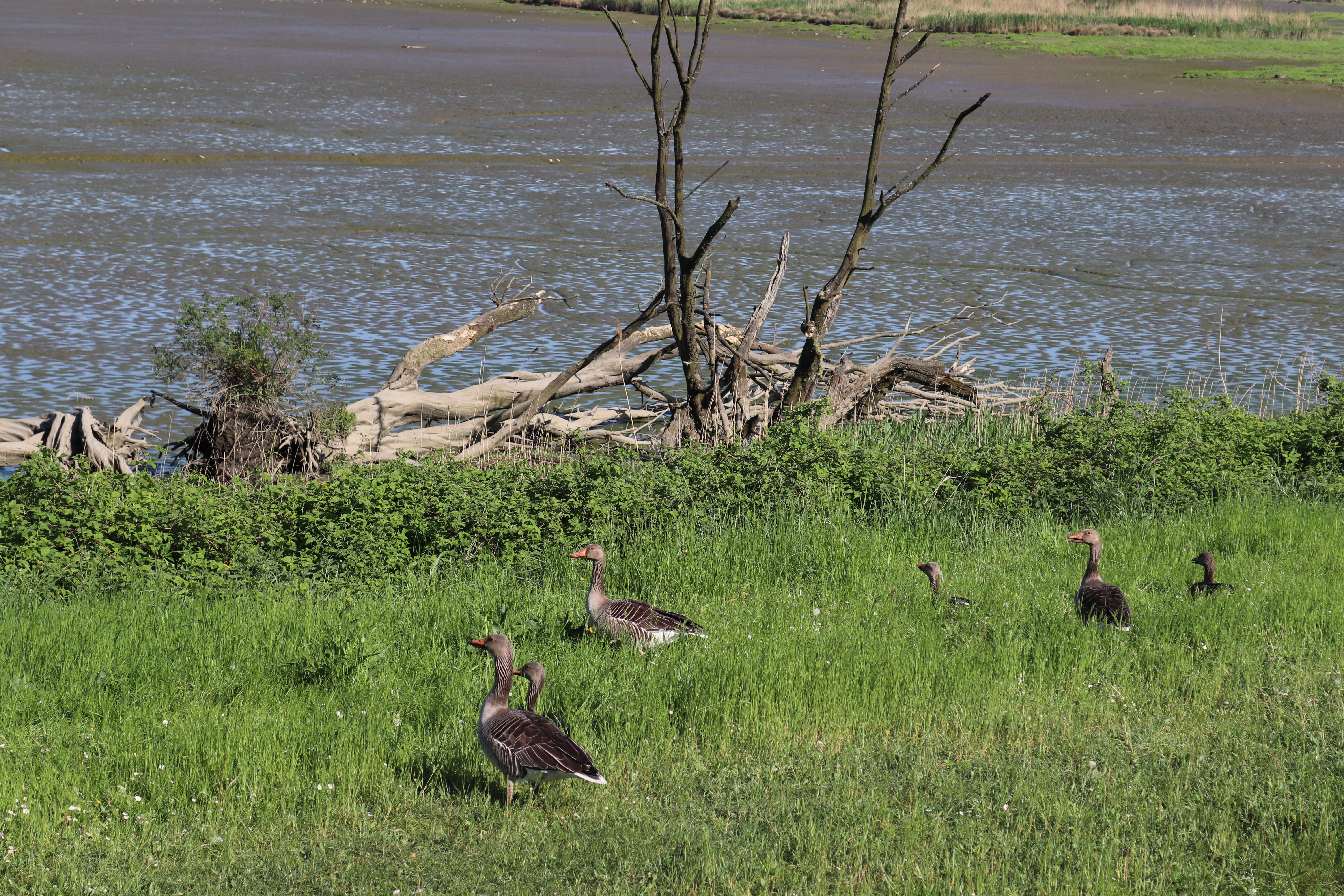 Naturschutzgebiet Holzhafen Hamburg